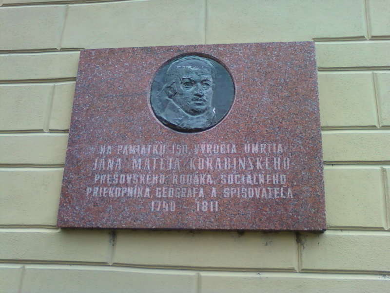 Мемориальная доска Яна Матея Корабинского на здании колледжа в Прешове, Словакия